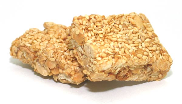 白芝麻花生軟糖 自製照片，現公開予所有人使用。 創建者：Glio